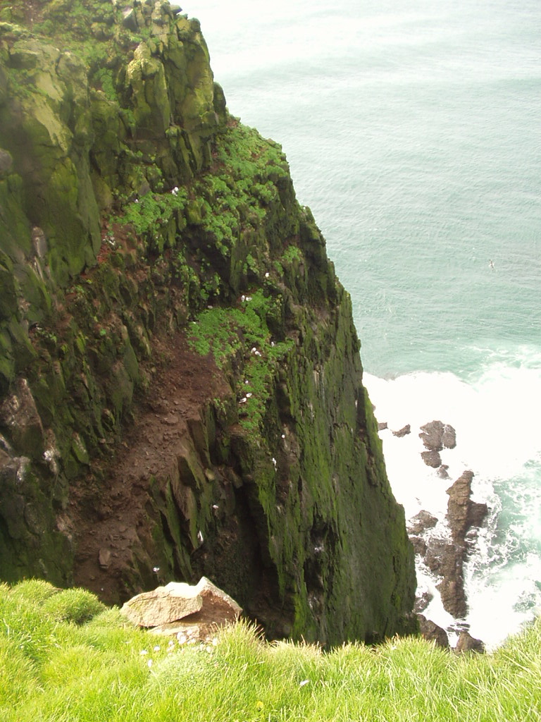 Klippan i Bjargtangar, Island. Foto: Narziss, augusti 2005.